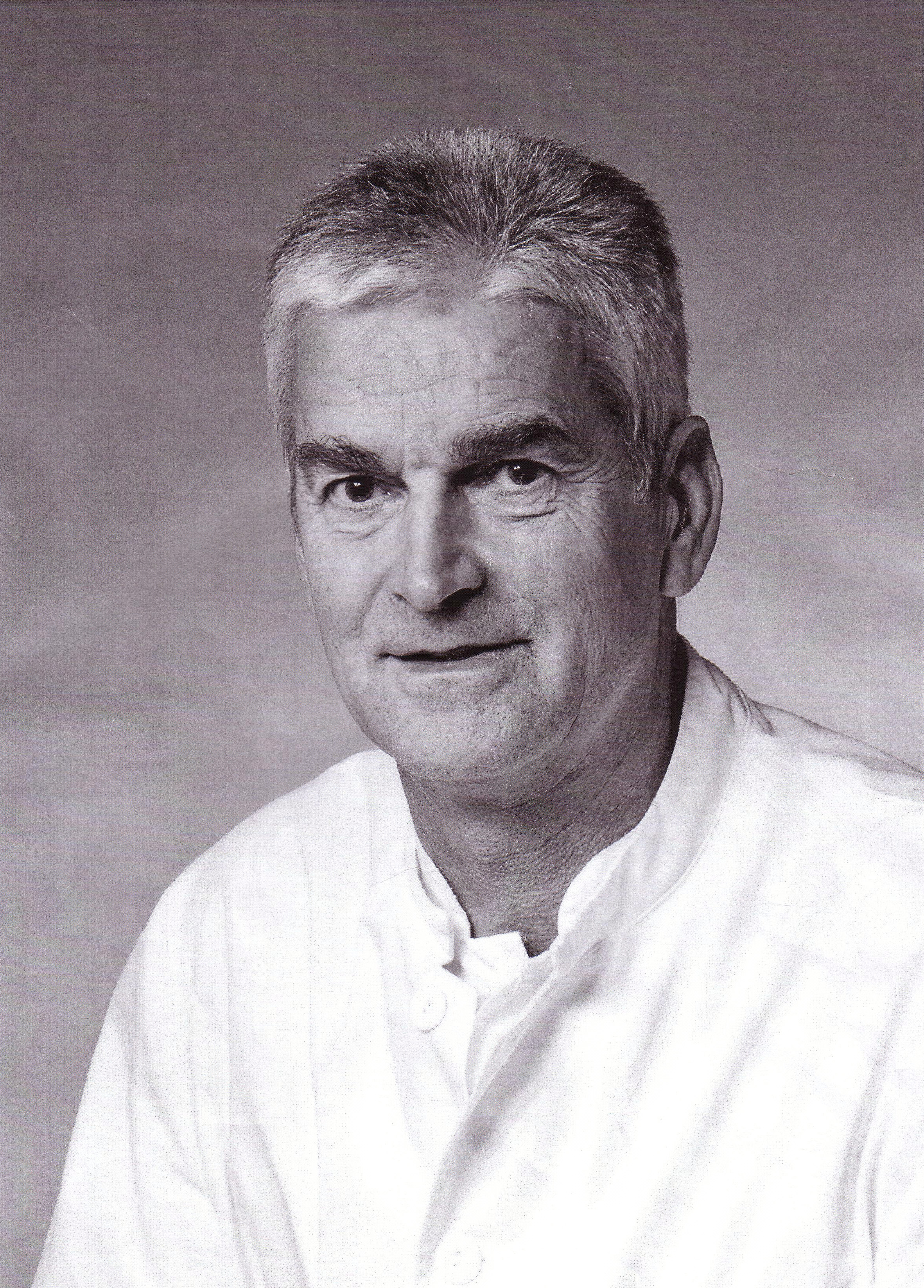 Porträtfotografie des Chirurgen Prof. Dr. med. Christoph Eggers, Hamburg